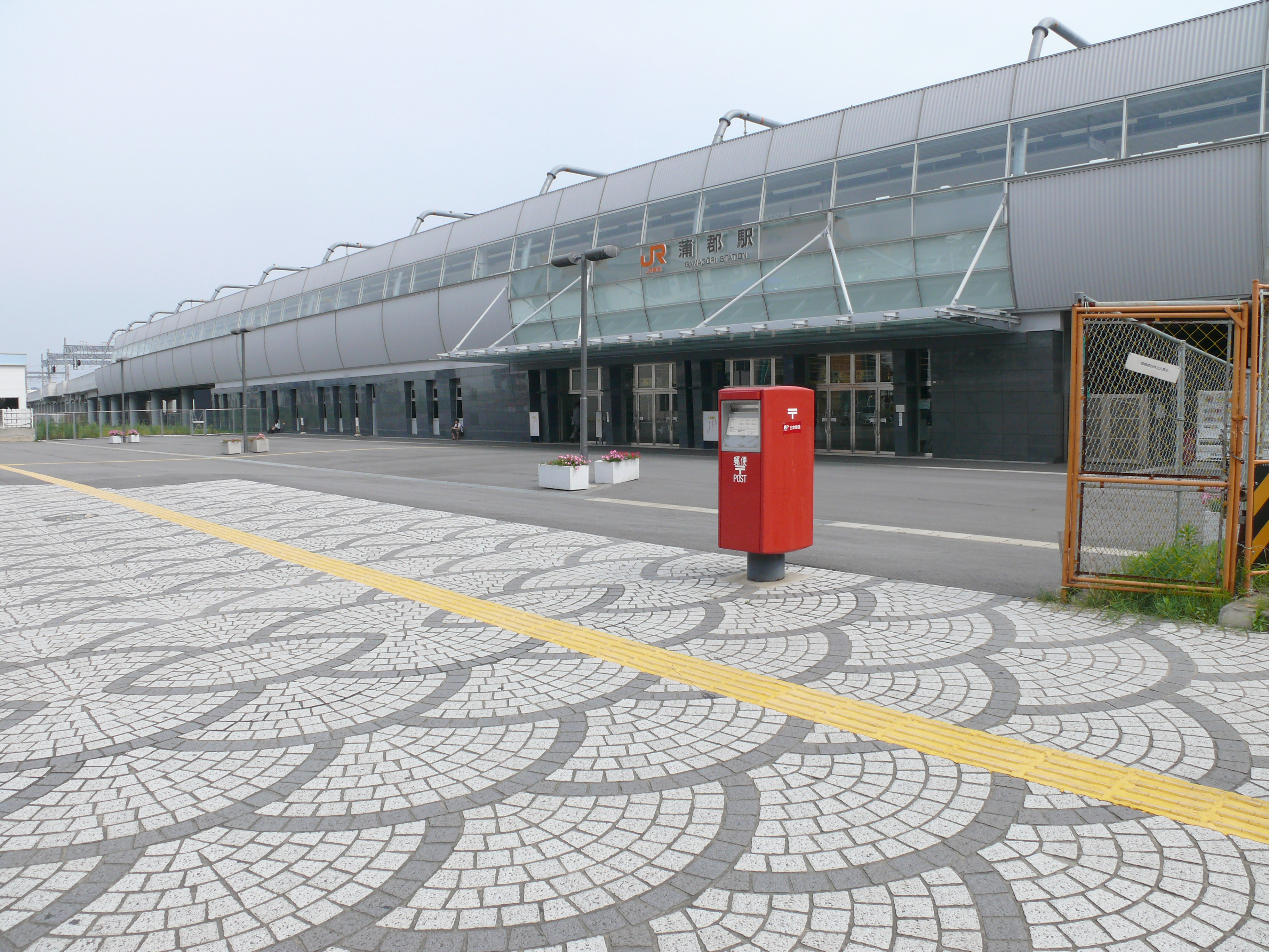 愛知県蒲郡市にあるJR東海の蒲郡駅。